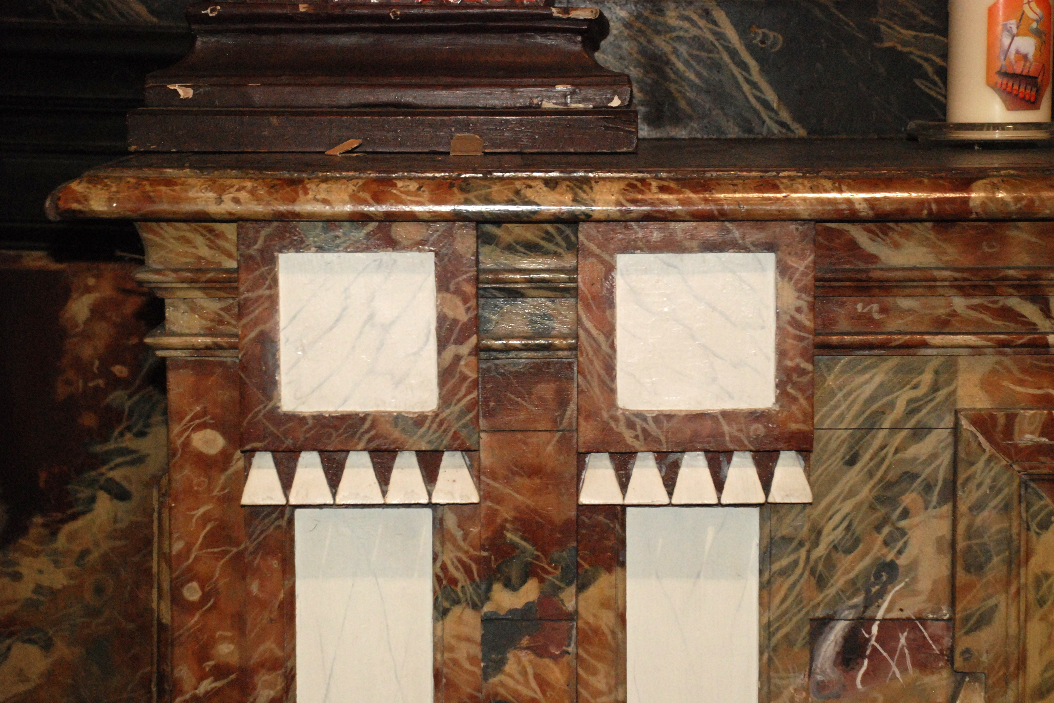 Belgique - Brabant wallon - Église Saint-Martin de Ways